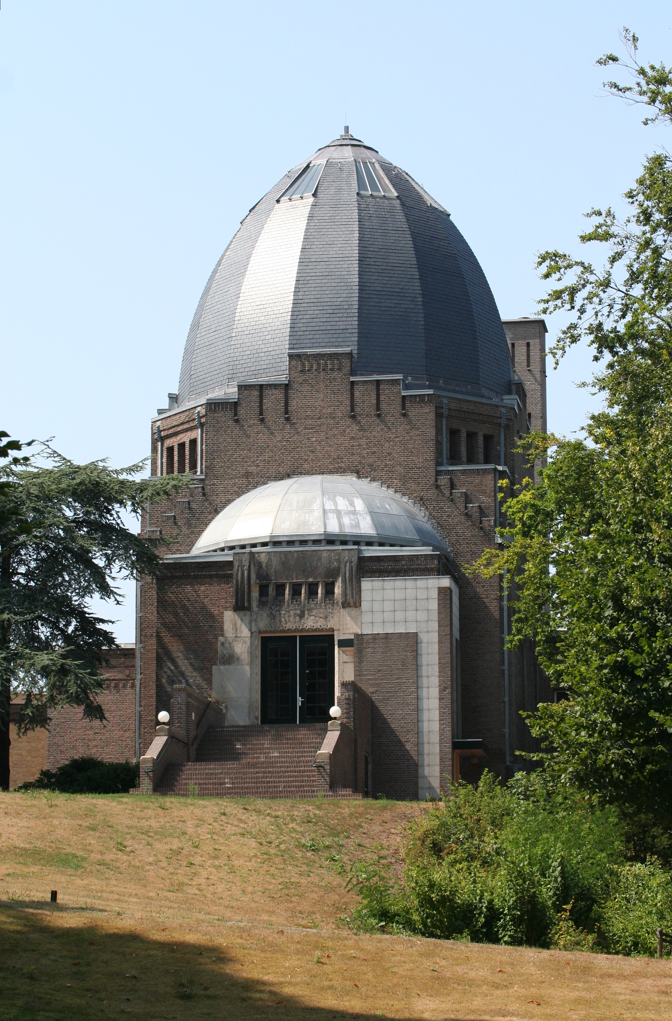 Crematorium Westerveld, Driehuis, the Netherlands